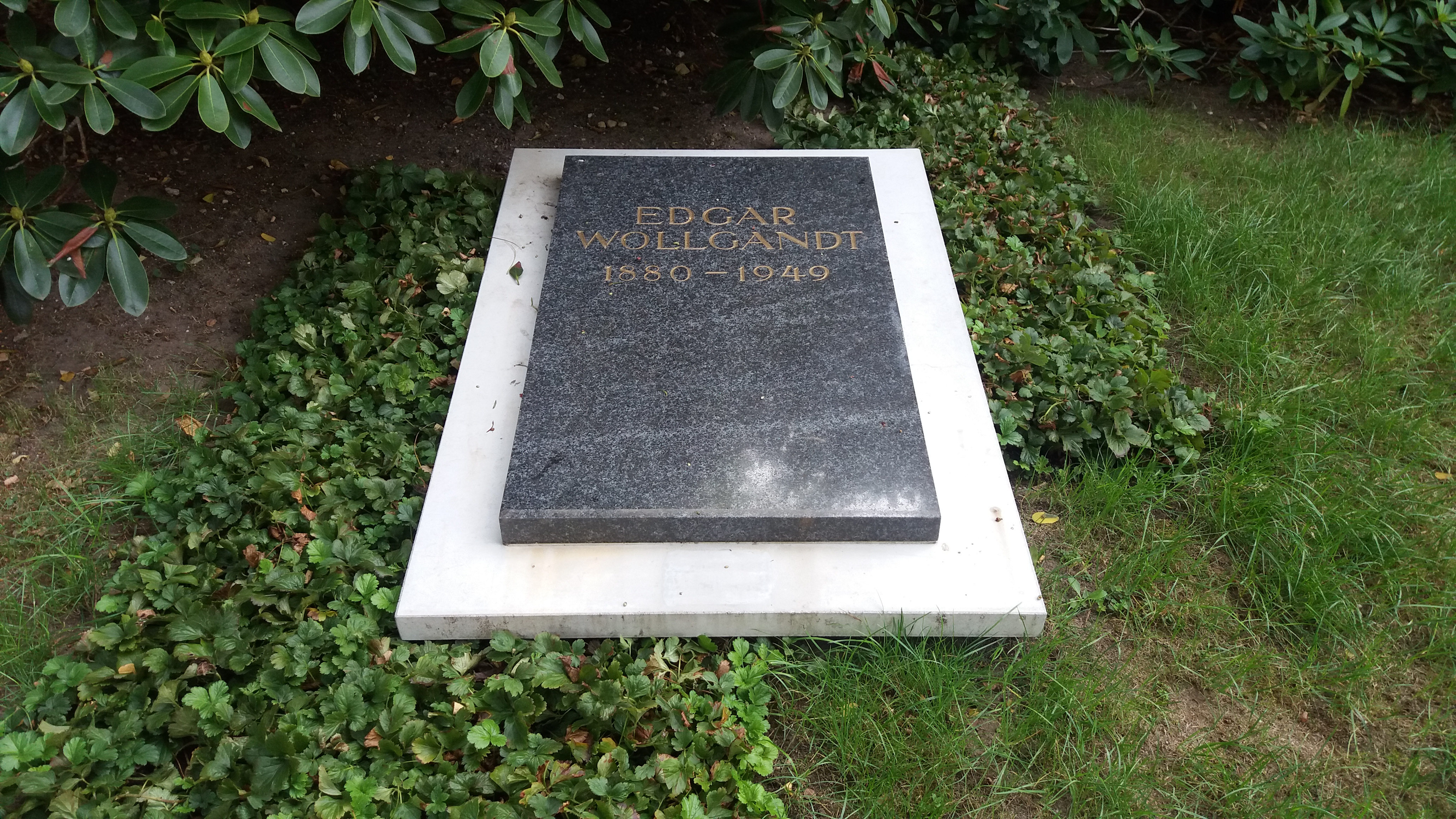 Grabstätte Edgar Wollgandt auf dem Südfriedhof in Leipzig